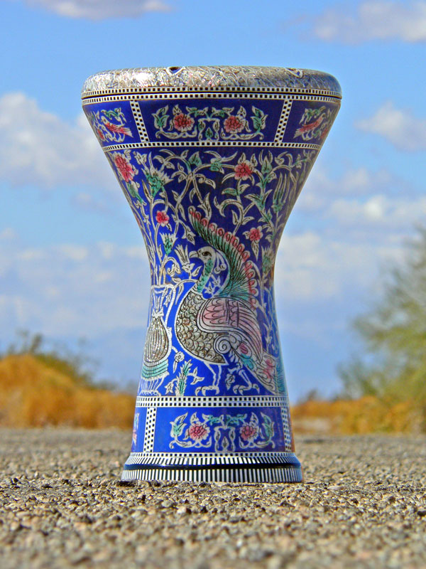 Goblet drum, photo taken by Kevin Hartnell on 02/23/2007.